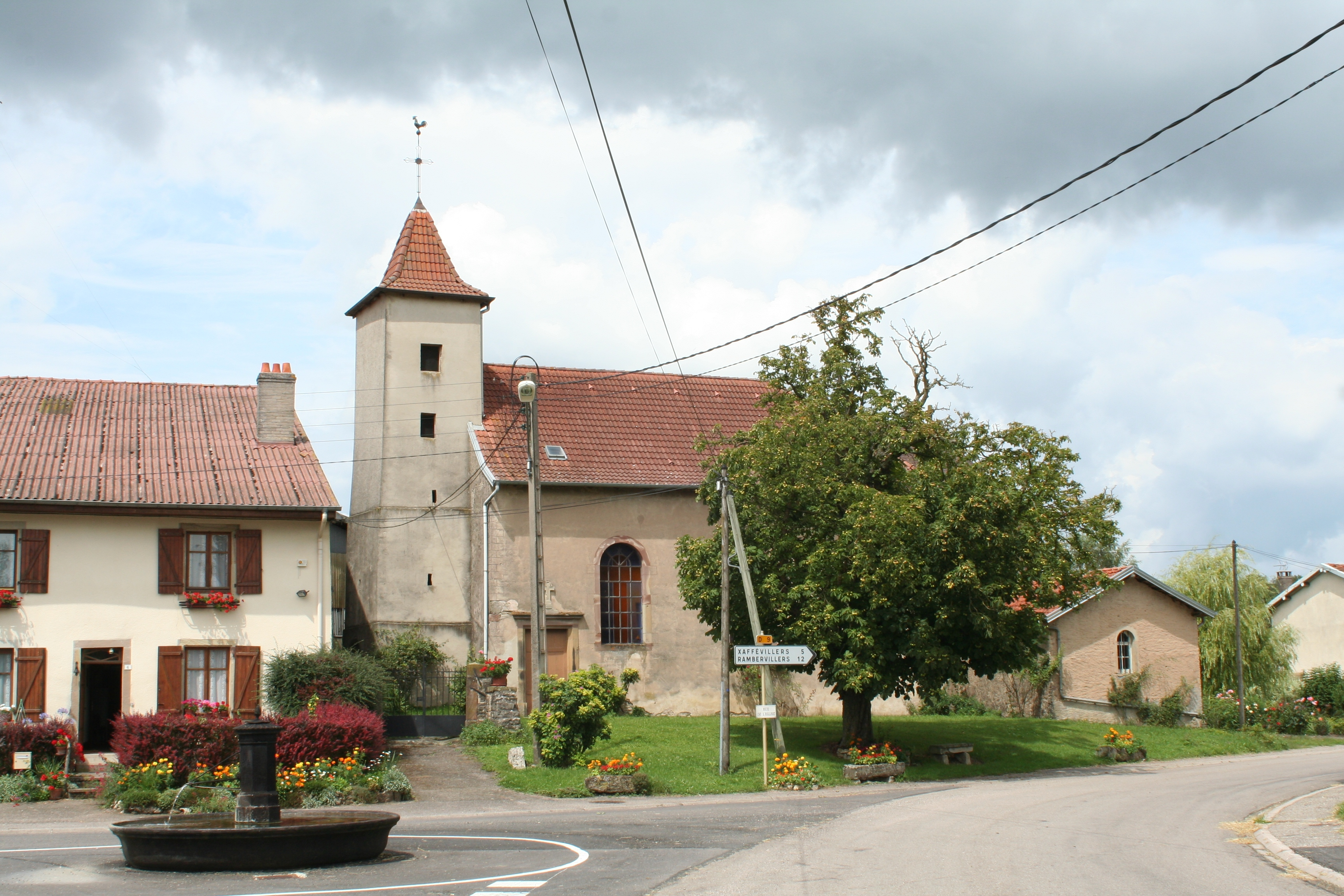 Église et fontaine de Deainvillers (Vosges)